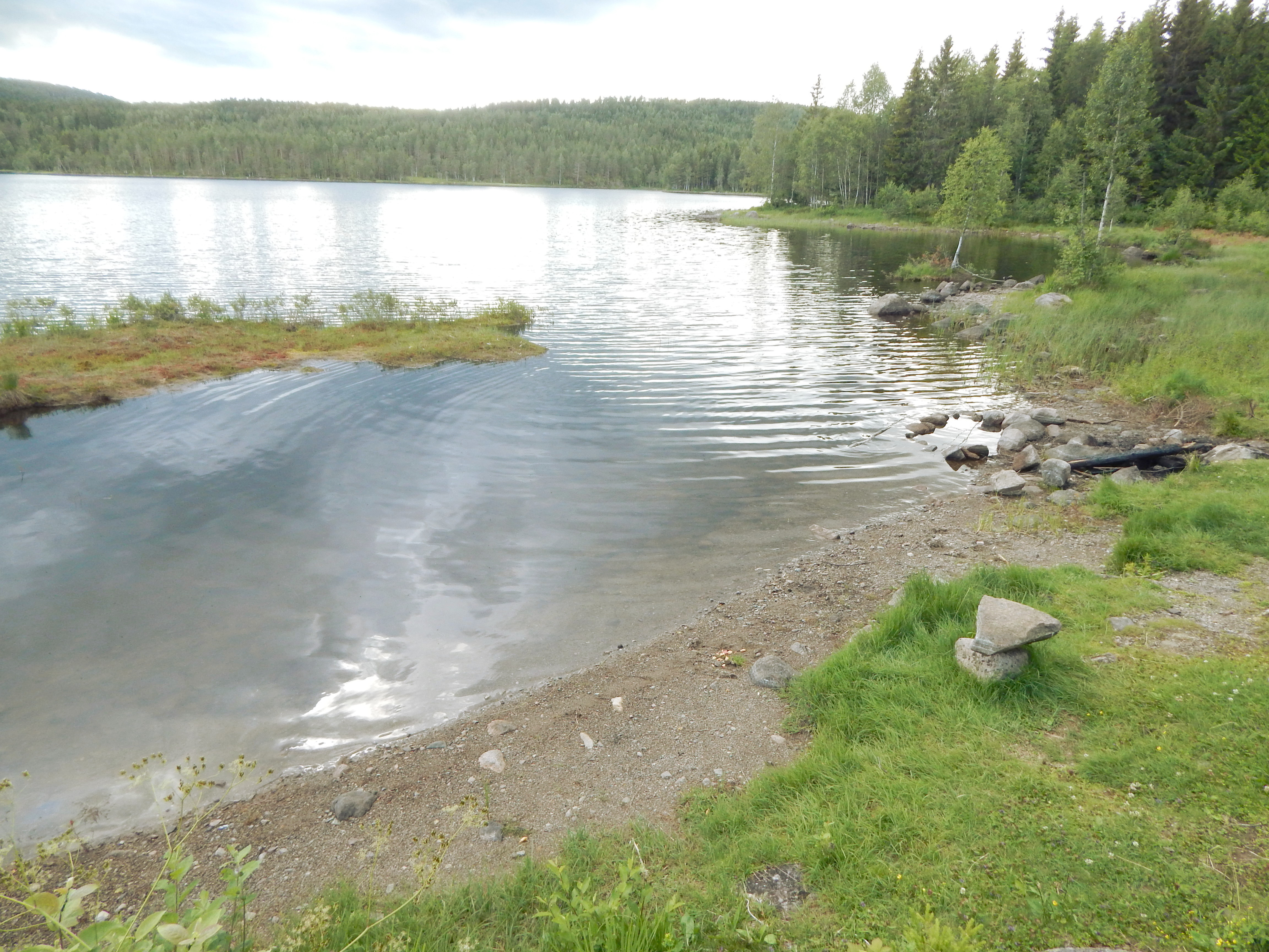 Rottungen i Nordmarka